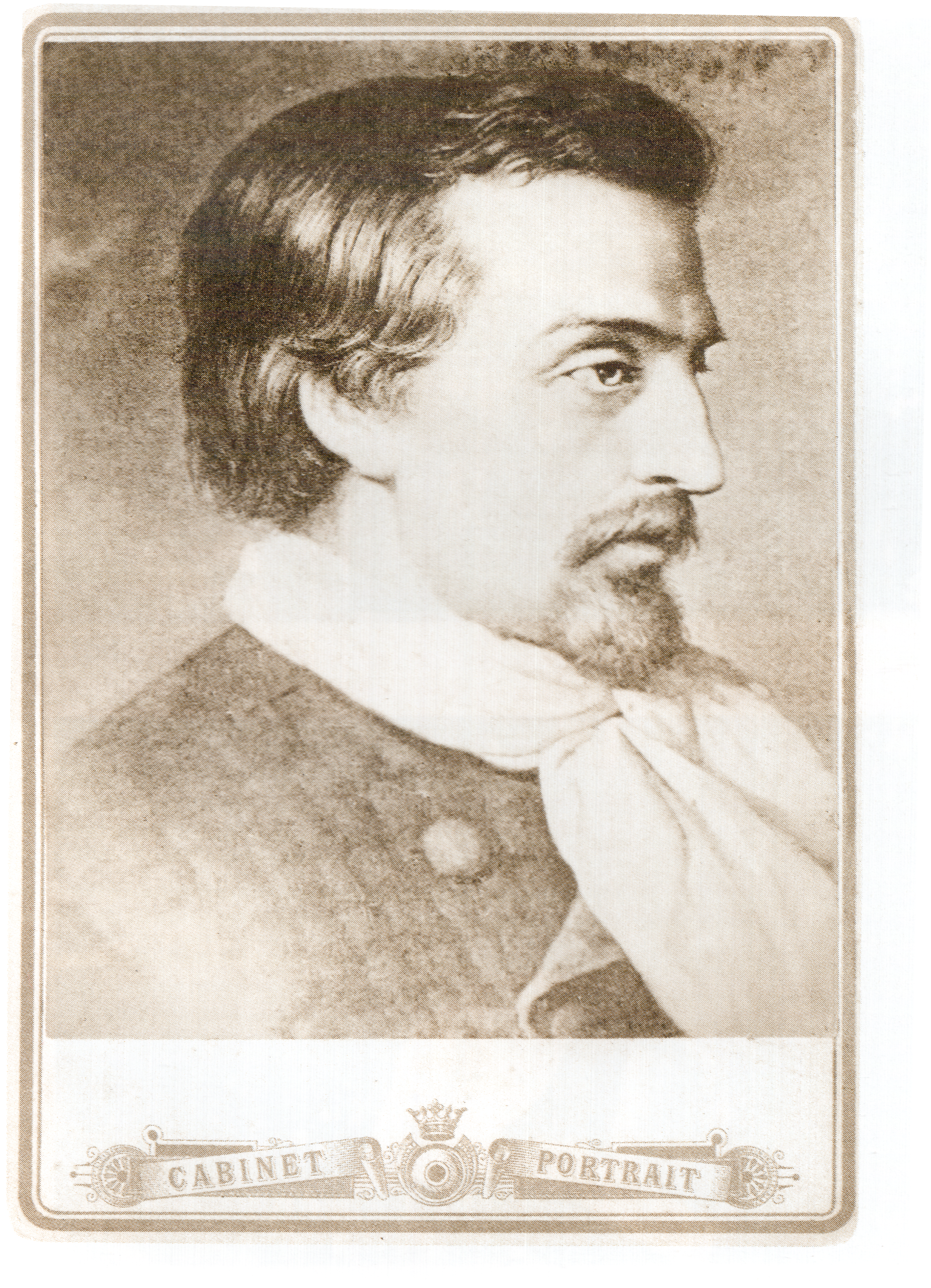 Heinrich Heine (1797-1856)